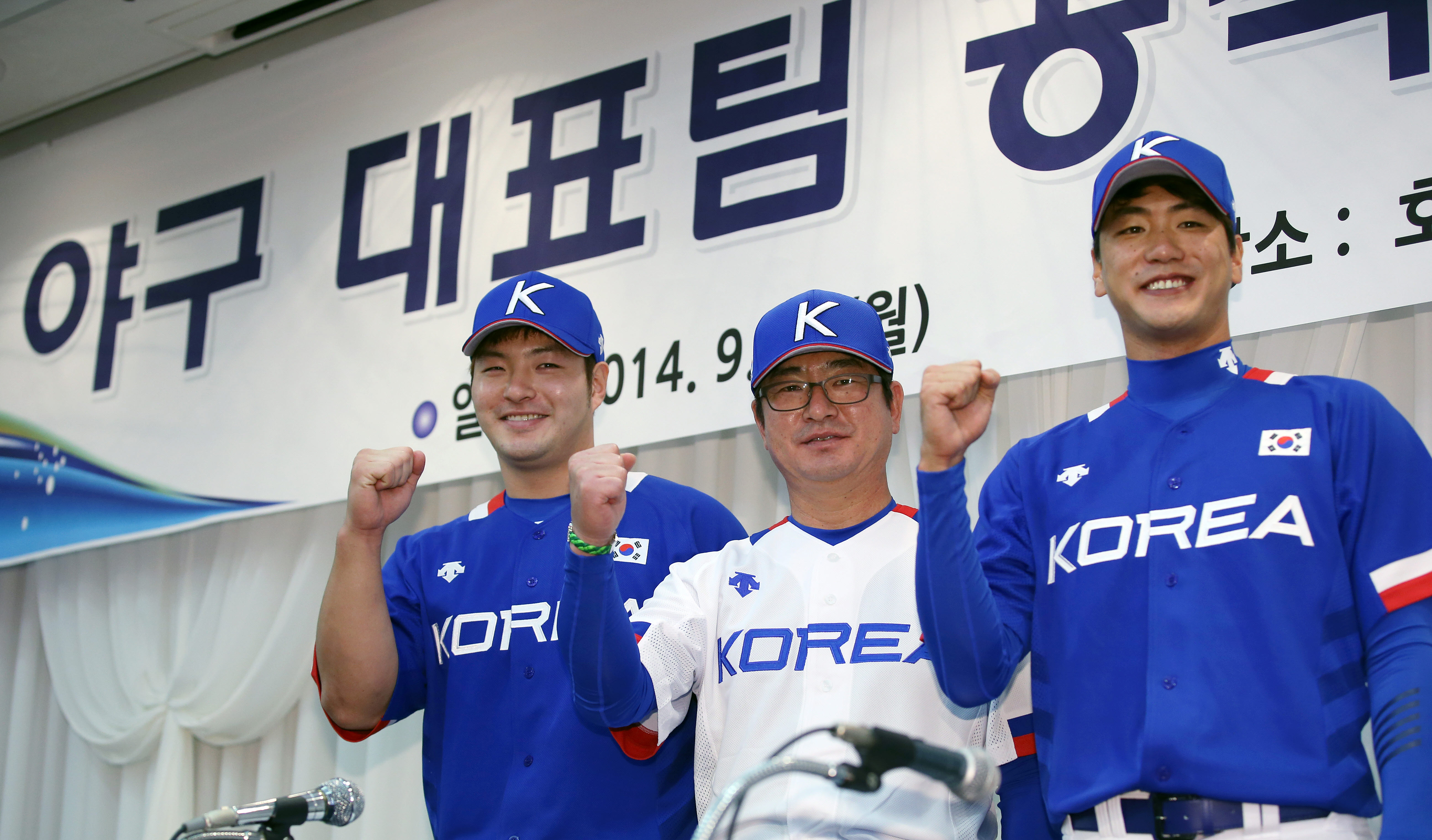 2014 아시안 게임 대한민국 야구 국가대표팀 기자회견